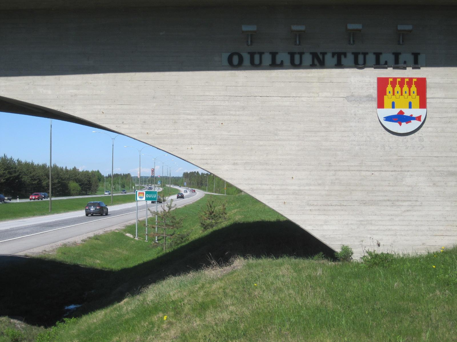 Ouluntulli-kyltti valtatiellä 4 (Pohjantiellä) Kempeleen ja Oulun kaupungin rajalla Ouluntullin eritasoliittymässä.